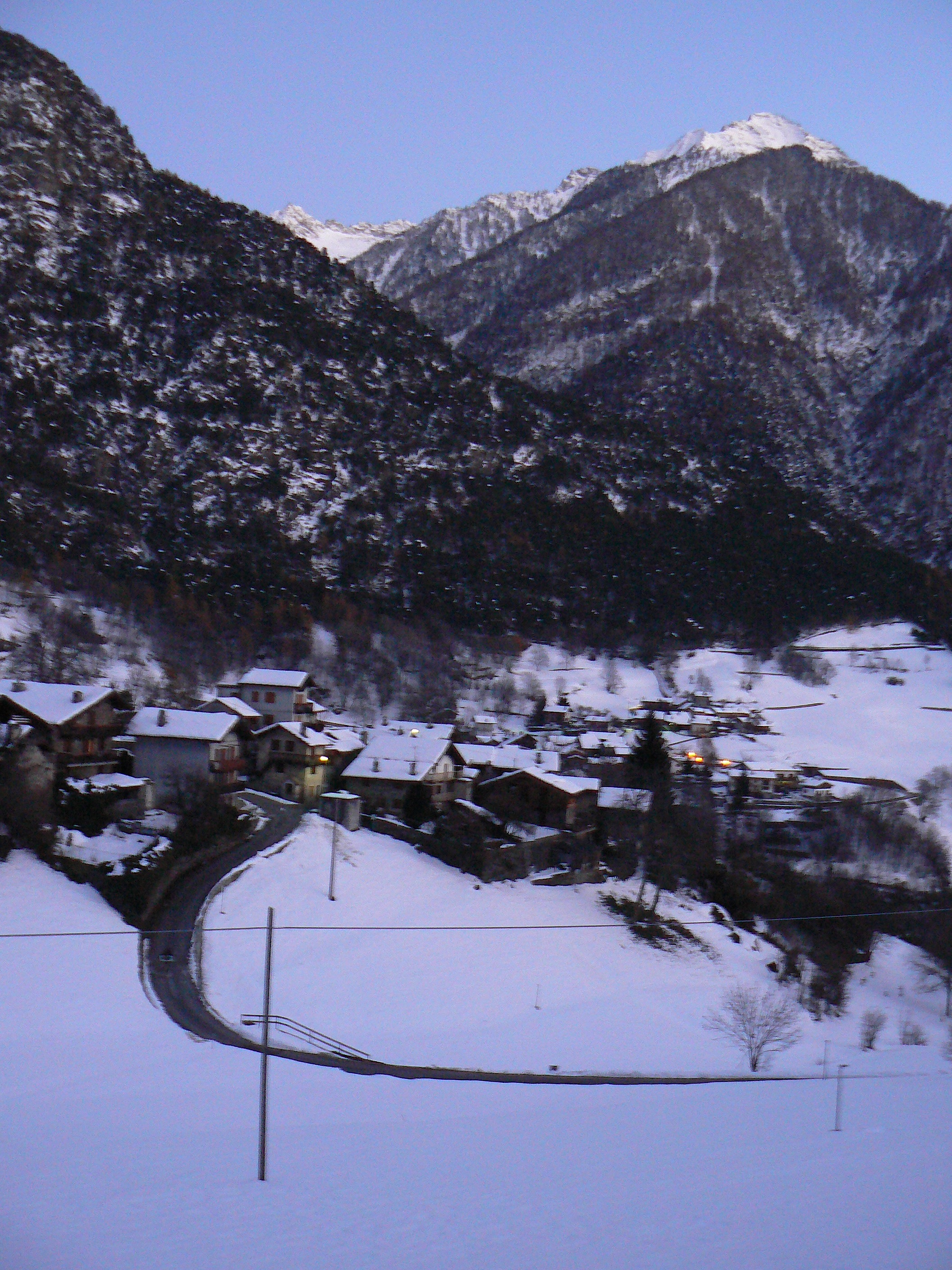 Frazione Maé, Challand-Saint-Anselme, Valle d'Aosta, Italia.